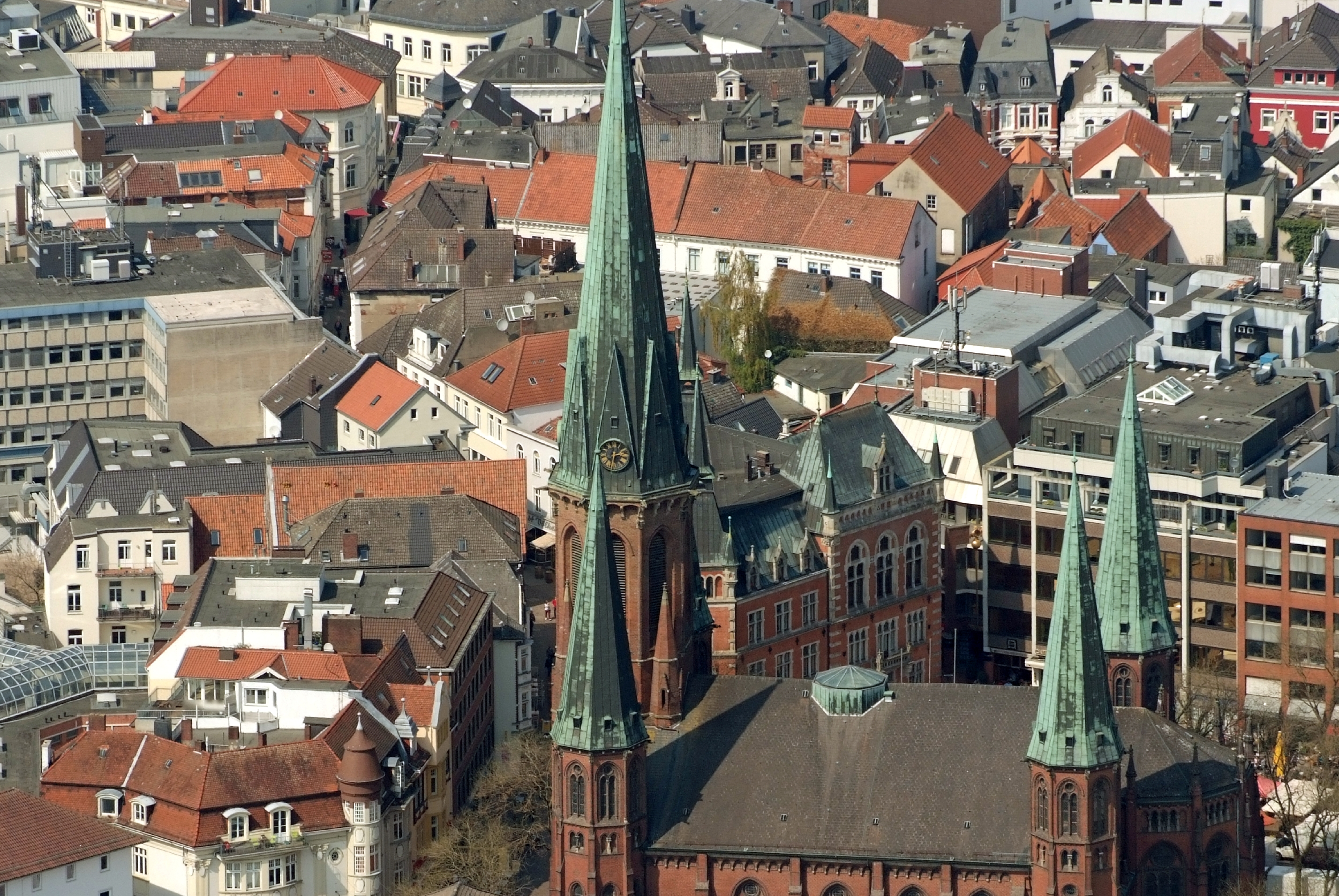 Vorne die Lambertikirche, dahinter das Oldenburger RathausFotoflug von Nordholz-Spieka nach Oldenburg und Papenburg